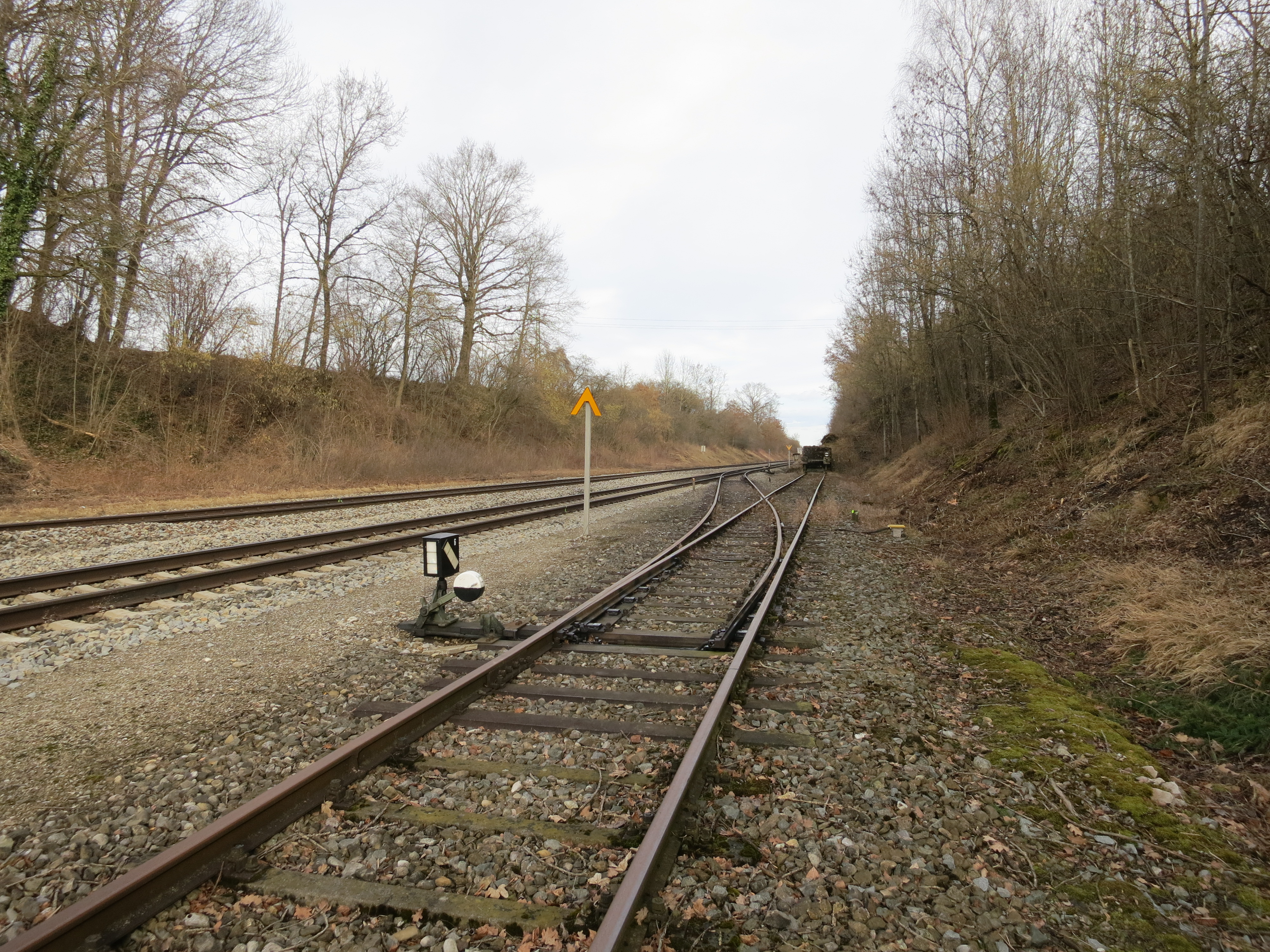 handbetriebene Weiche des Anschlussgleises zum Fliegerhorst Penzing im Bahnhof Epfenhausen im Jahr 2014